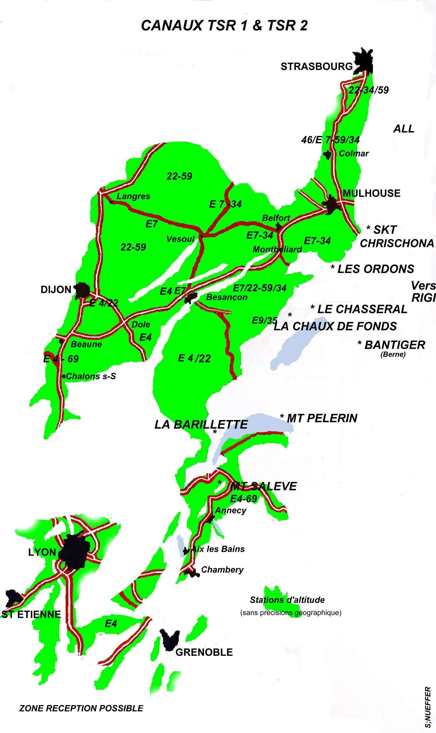 Carte technique, zones, de couverture possible de la télévision suisse romande TSR 1 et/ou TSR 2 en France avec des antennes TV VHF et/ou UHF adaptées (parfois avec préampli). Concerne le réseau analogique, voire peut être numérique, TNT dans les zones équipées : La Barillette depuis juin 2005, Bâle mai 2006, puis les Ordons et le Chasseral (fin 2006). NB : cette carte (basée analogie) sera certainement obsolète avec la diffusion numérisée, car il apparaît déjà qu'on ne peut plus accèder à la télévision suisse via le "nouveau" réseau TNT, surtout en Savoie, Haute Savoie, Jura, Ain, Isère, Drôme et région lyonnaise. NB : L'échelle de la carte ne peut mettre en évidence les zones d'ombres locales hertziennes de la SSR, ni les cohabitations de canaux (fréquences) identiques et adjacents, incompatibles.